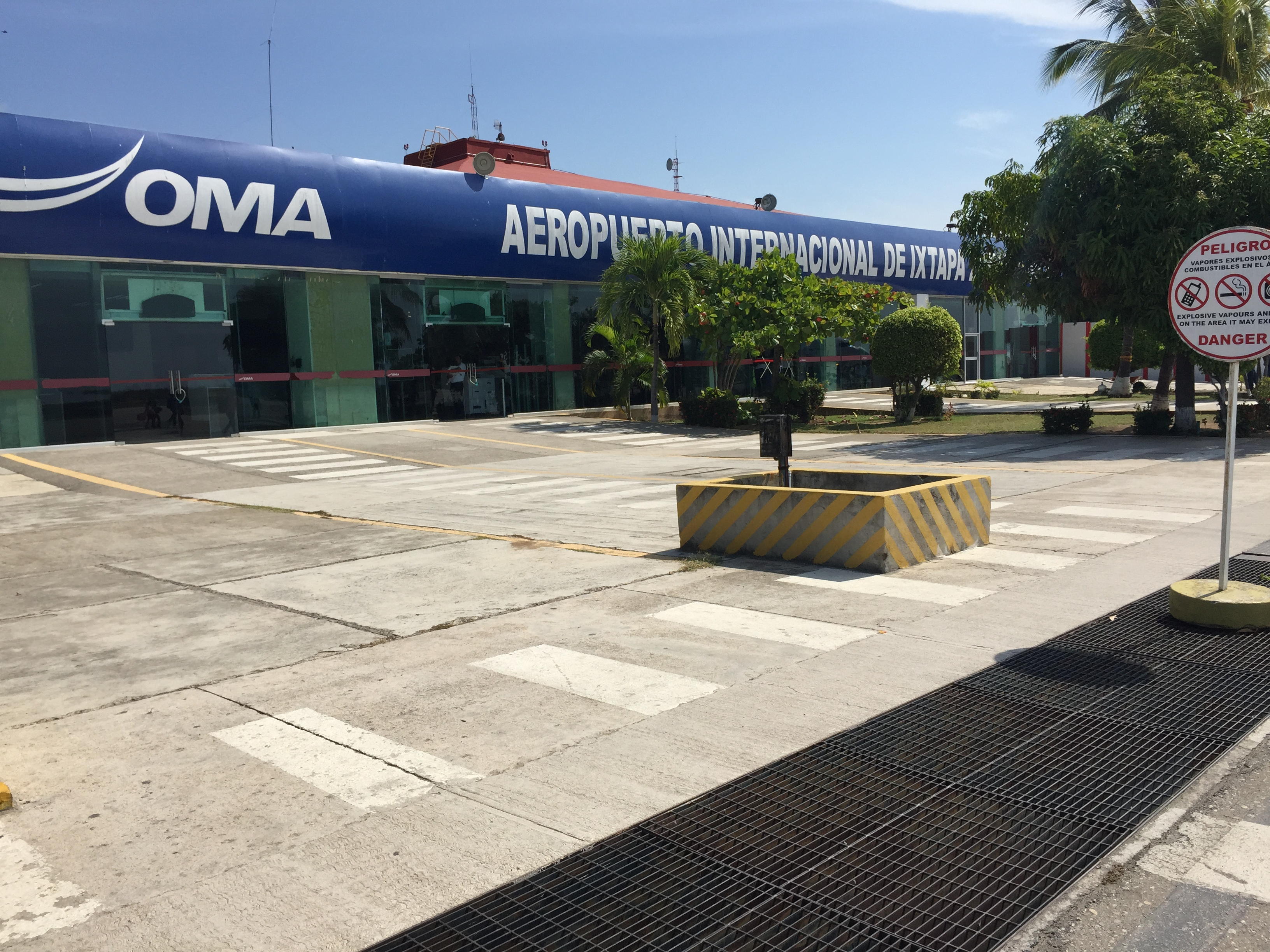 Vista aérea del Aeropuerto de Ixtapa-Zihuatanejo.